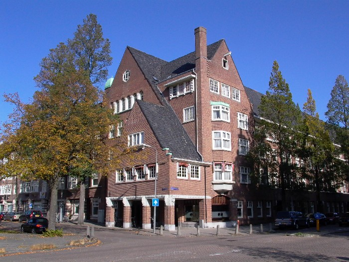 Foto gemaakt door Daniel van der Ree